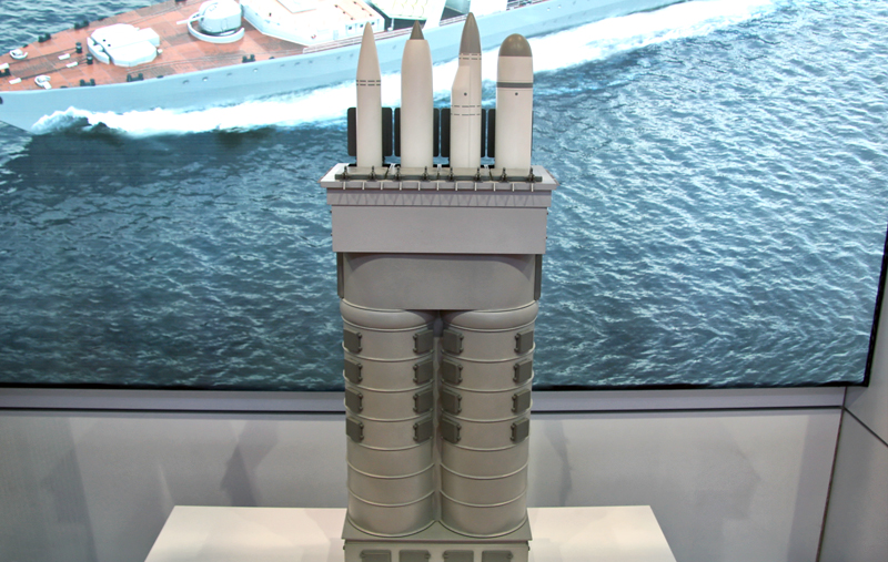 Модульный комплекс ракетного оружия Club-U (Modular missile system Club-U)